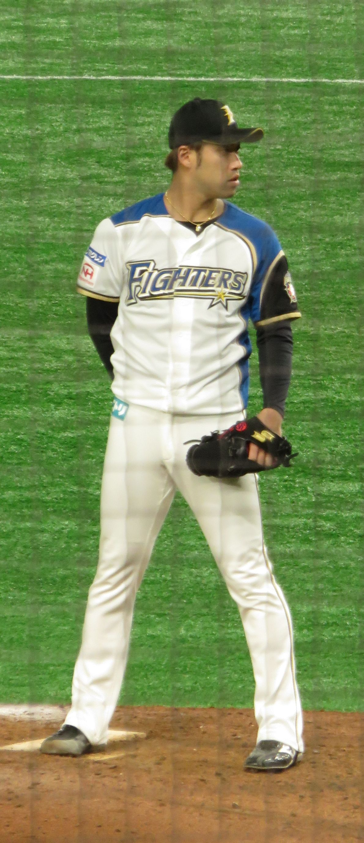 北海道日本ハムファイターズの秋吉亮投手